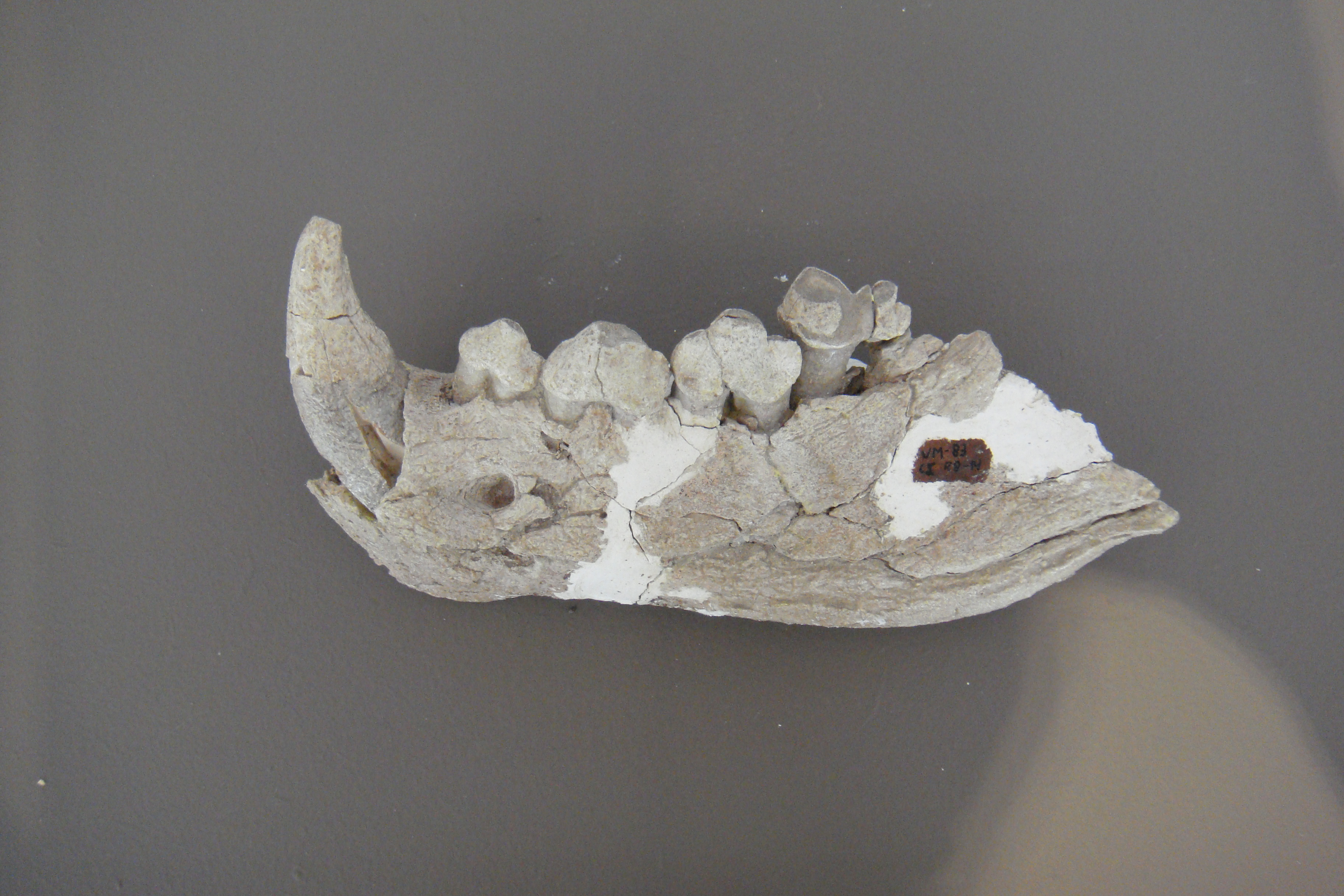 Museo de Prehistoria de Orce